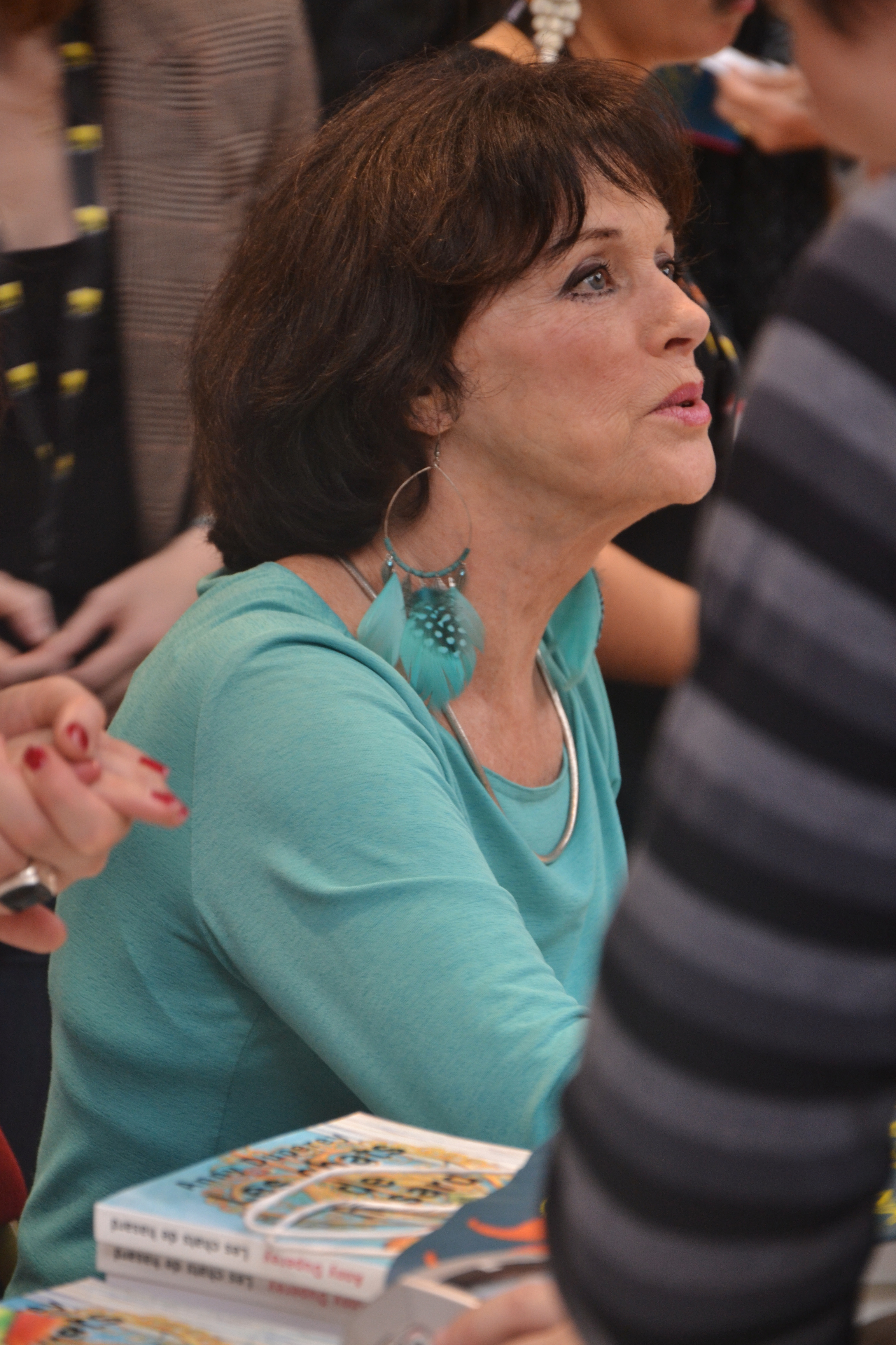 Anny Duperey à la 30e Foire du livre de Brive-la-Gaillarde